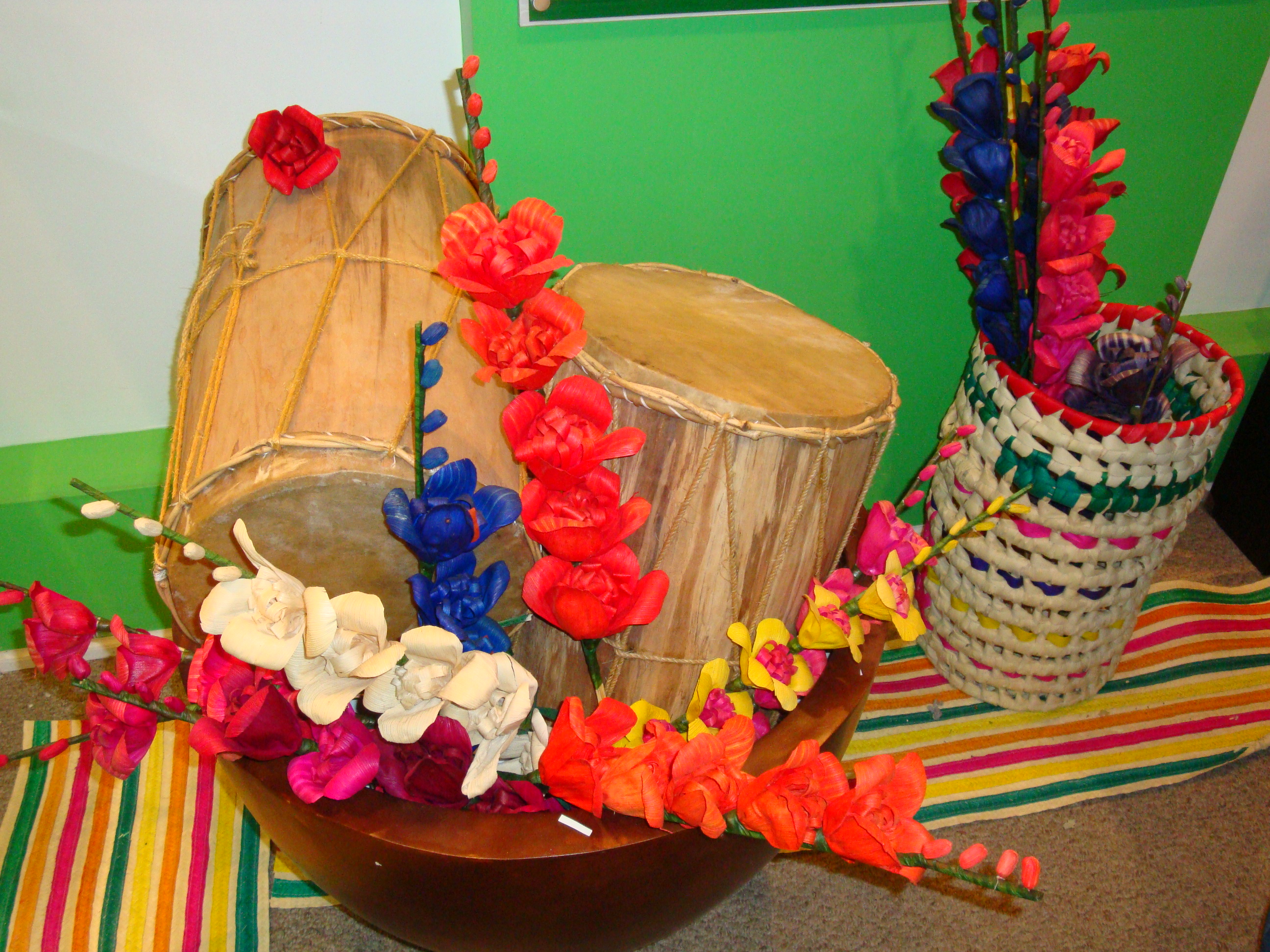 Artesanías hechas a base de jacinto y joloche, así como tambores típicos del municipio de Nacajuca, Tabasco, México.